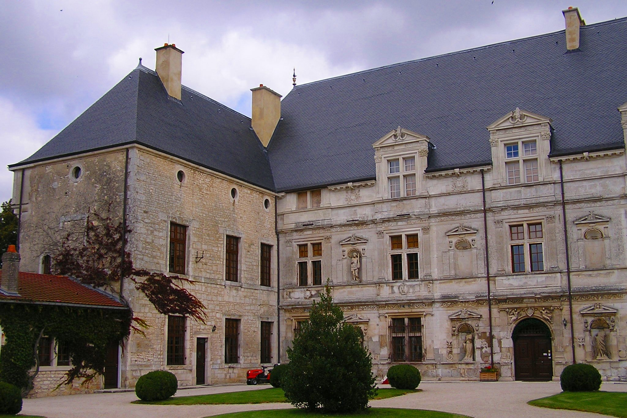 extérieur du chateau de Montbras (meuse)